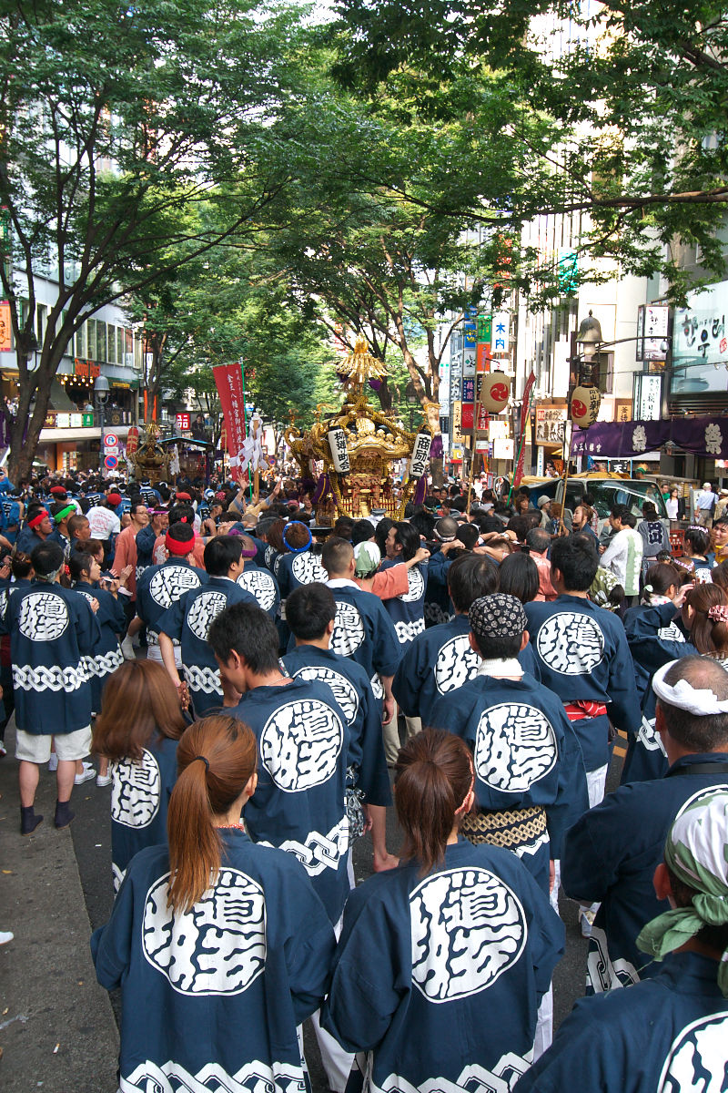 渋谷道玄坂を行く金王八幡宮秋祭りの神輿。東京都渋谷区渋谷。